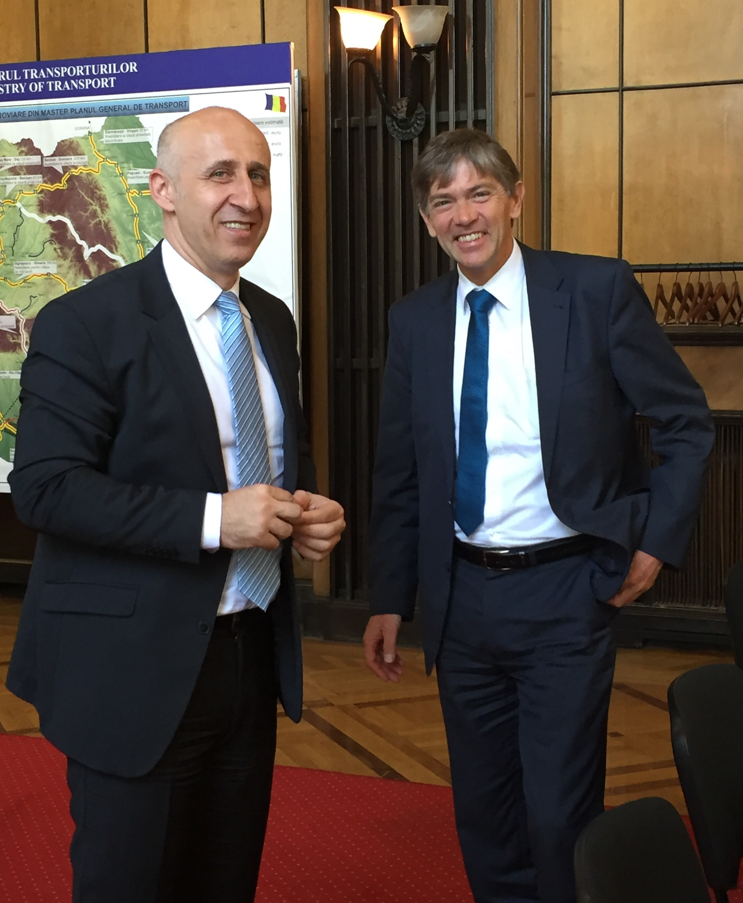 Cu Libor Lochman, directorul executiv al Comunității Căilor Ferate Europene - CER